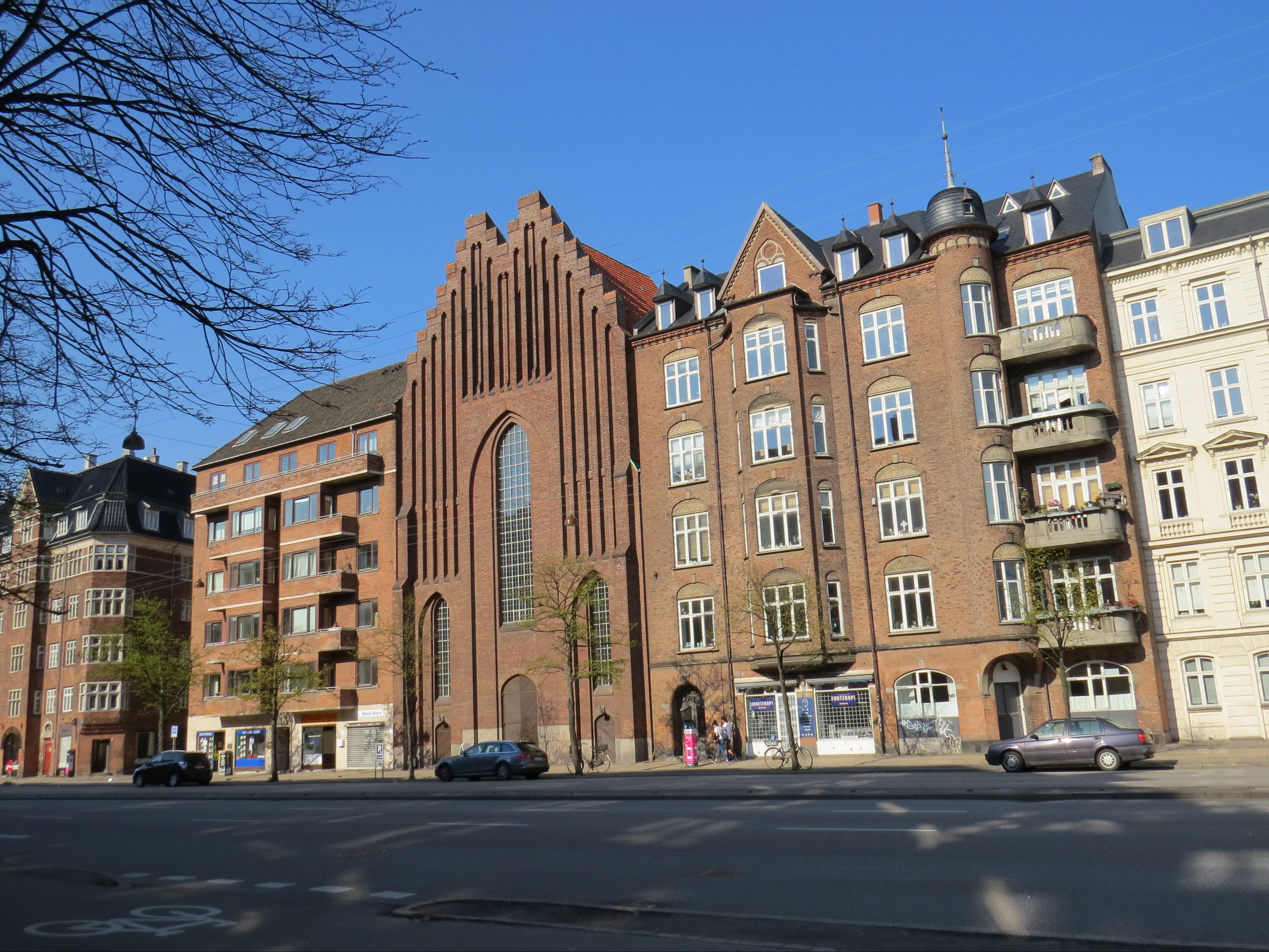 Bethlehemskirken, København